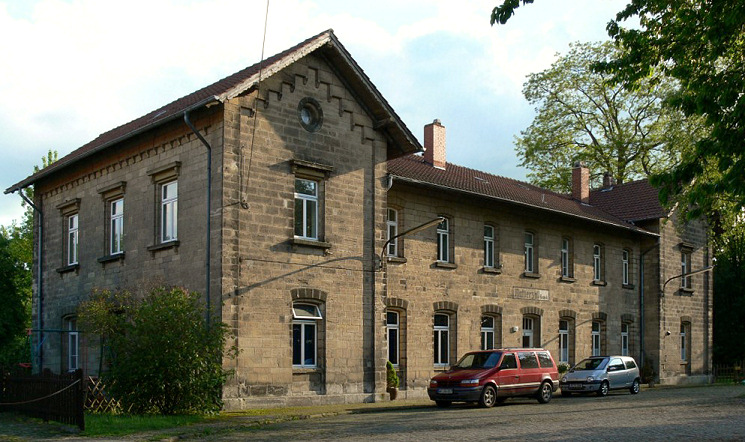 Ehemaliger Bahnhof Mattierzoll in Winnigstedt.